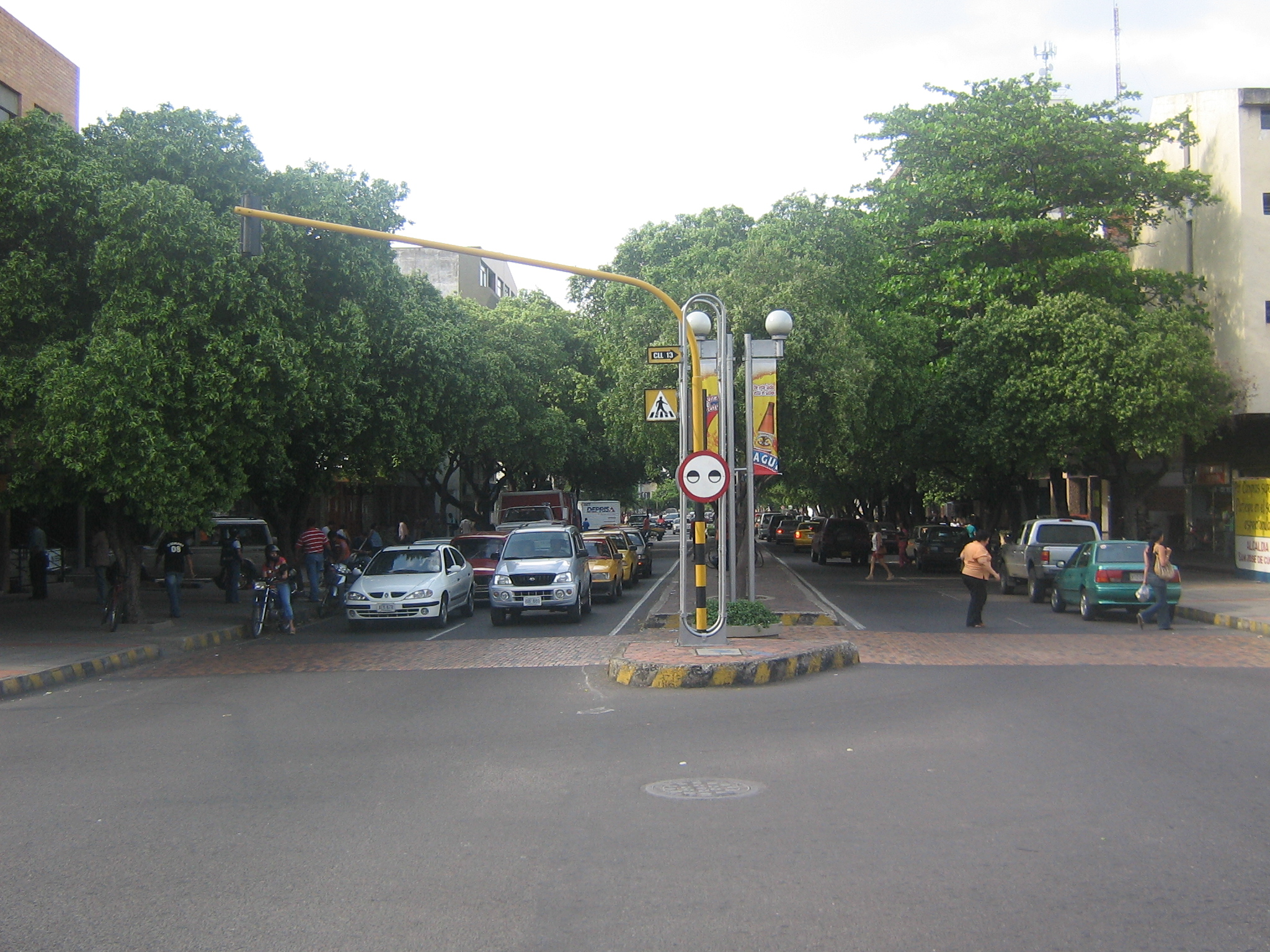 Cúcuta - Av. 0 Calle 13